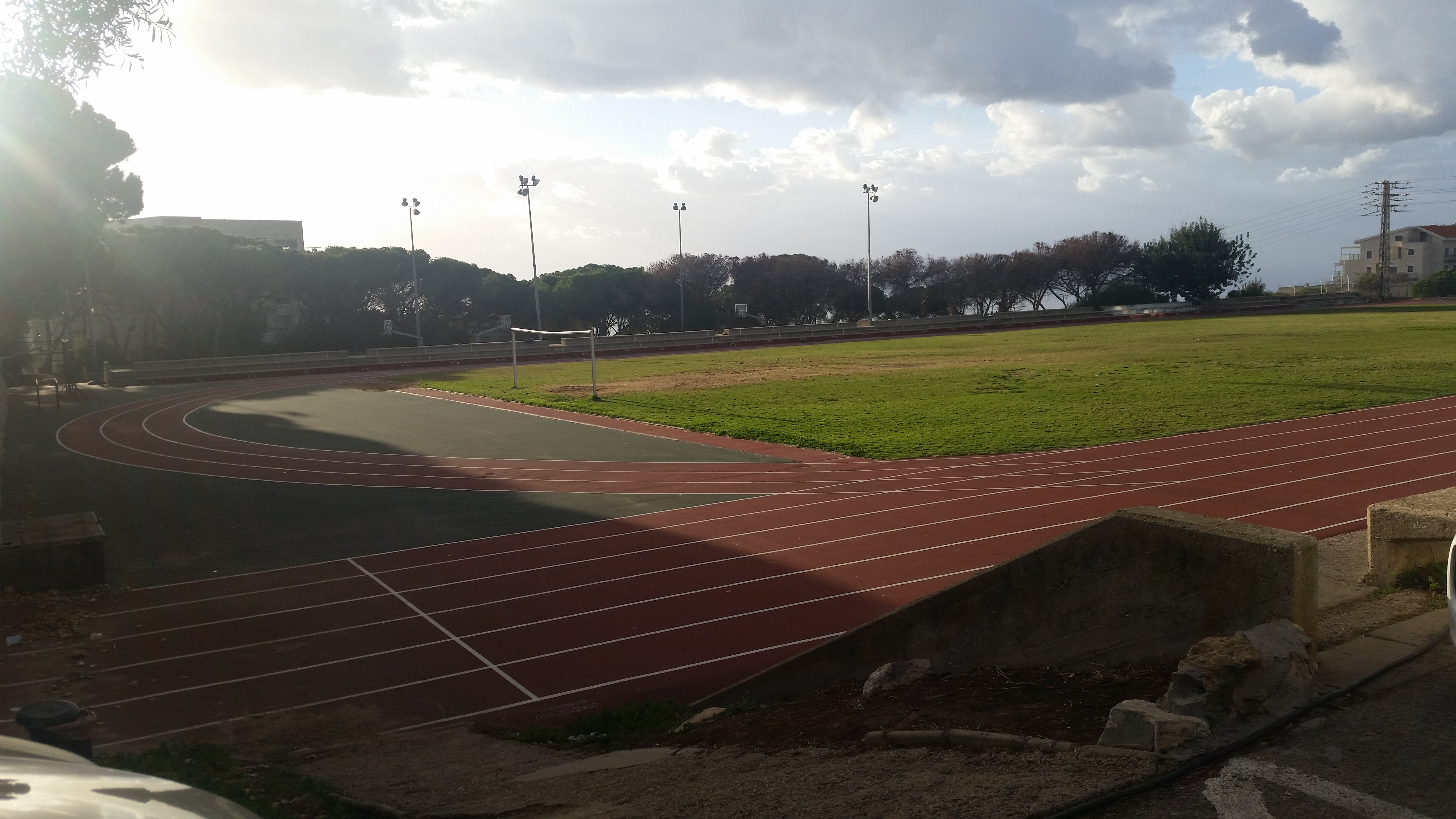 קמפוס בית בירם שוכן על הכרמל שייך לבית הספר הריאלי מגרש הכדורגל של הקמפוס